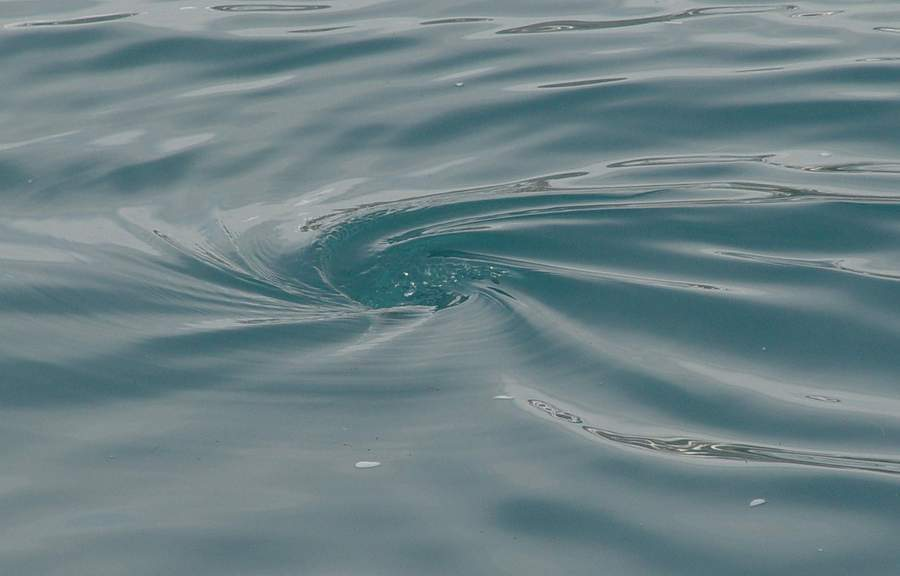 Wasserstrudel, Speicherbechen am Ytste Mardola